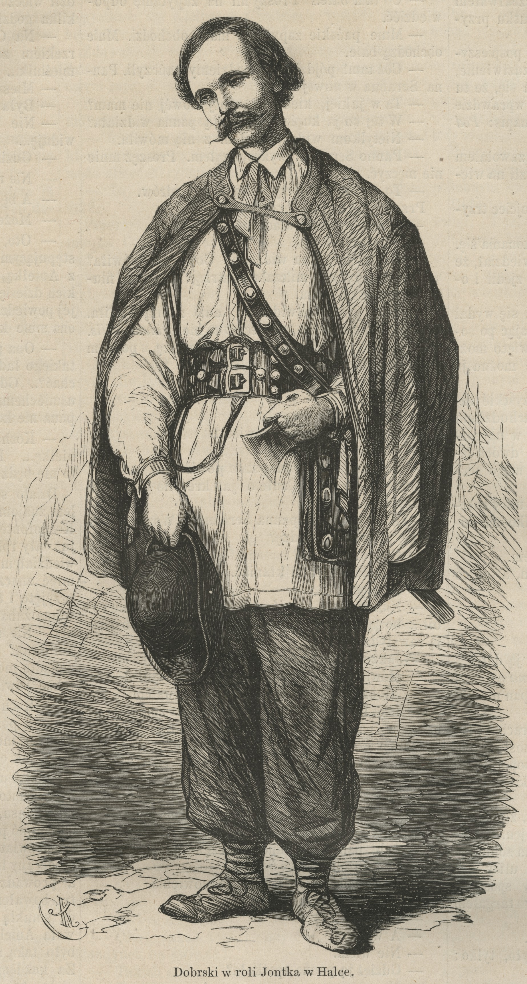 Polish operatic tenor